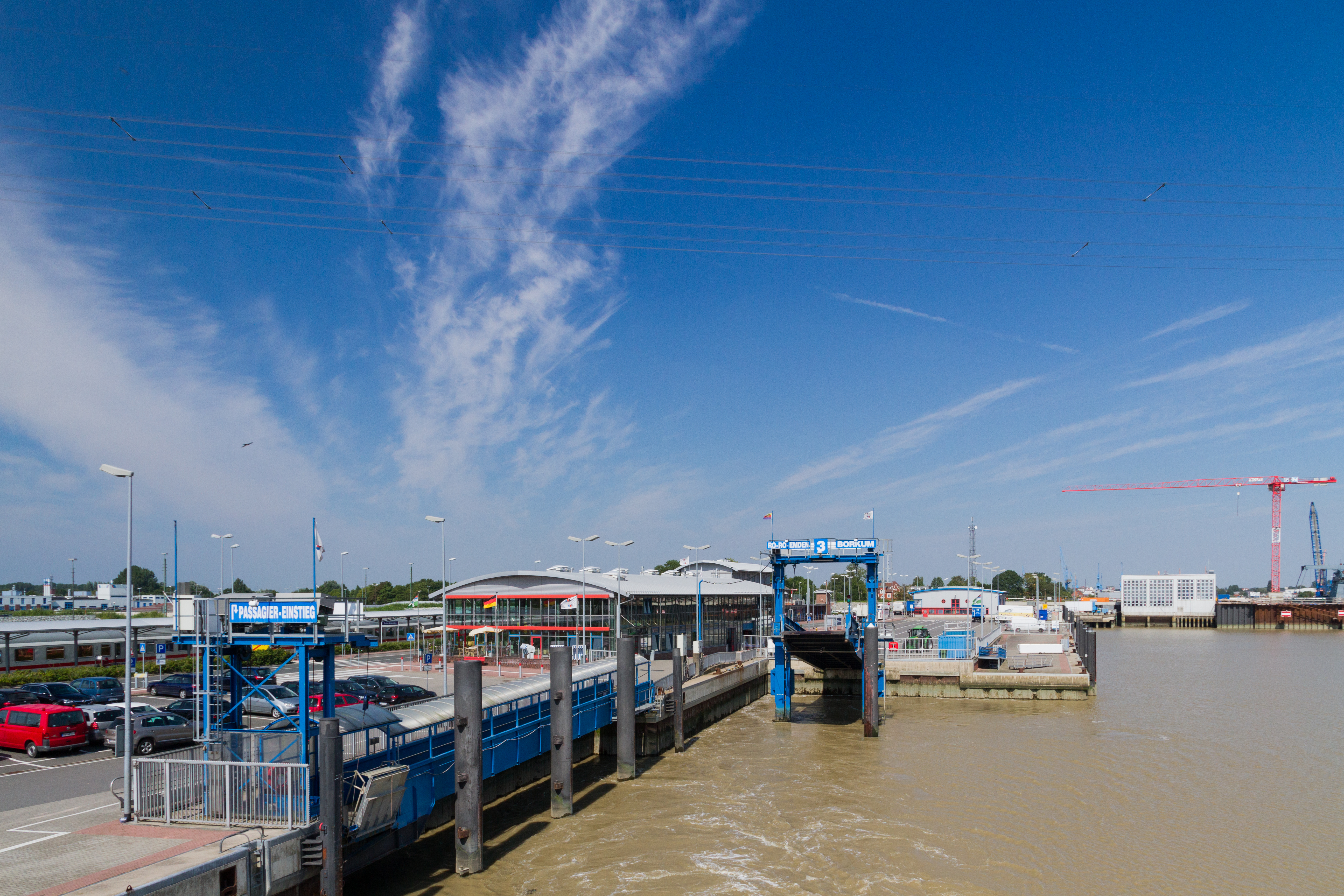 Emden Außenhafen